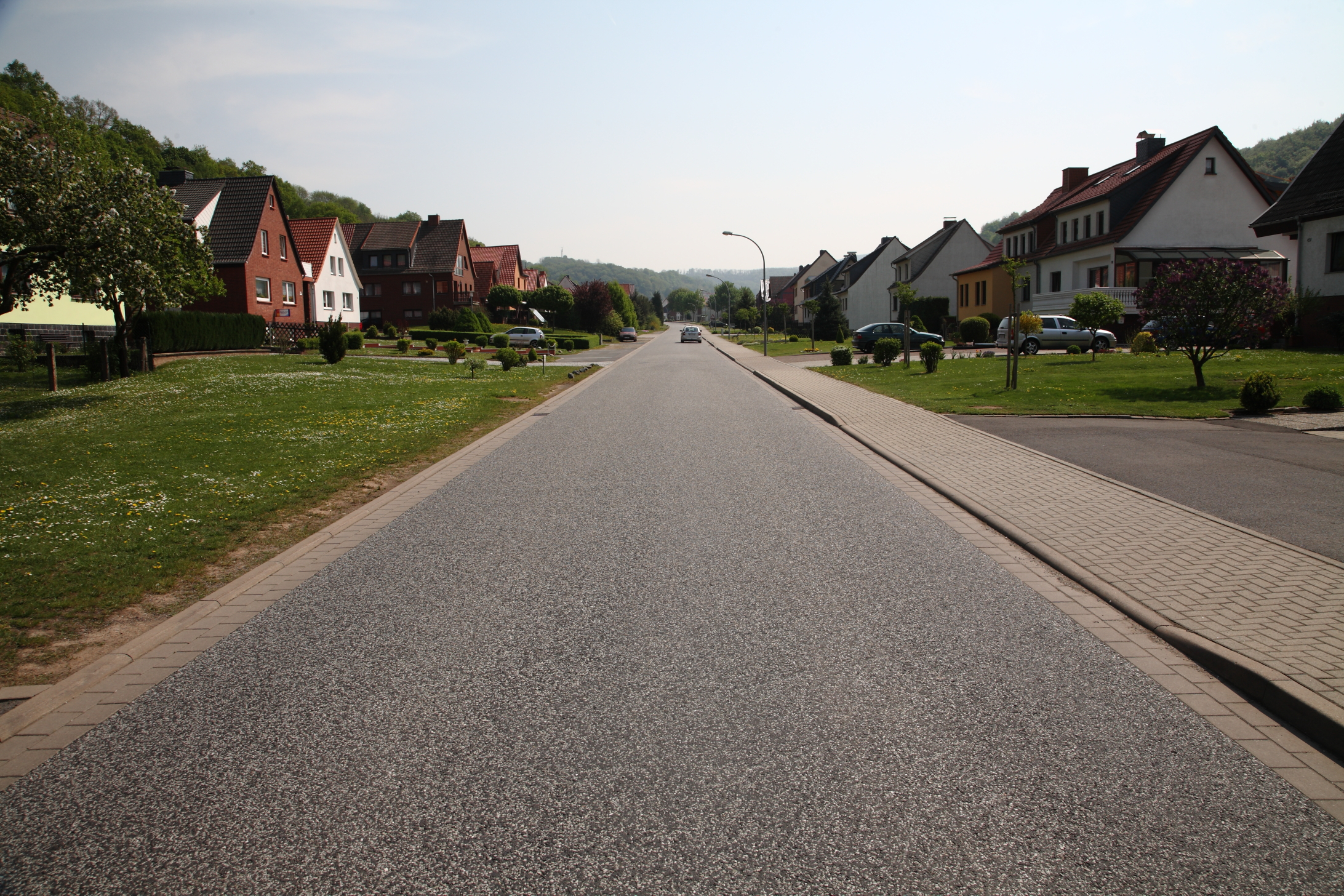 Die L1011 in Brehme (Hauptstraße).